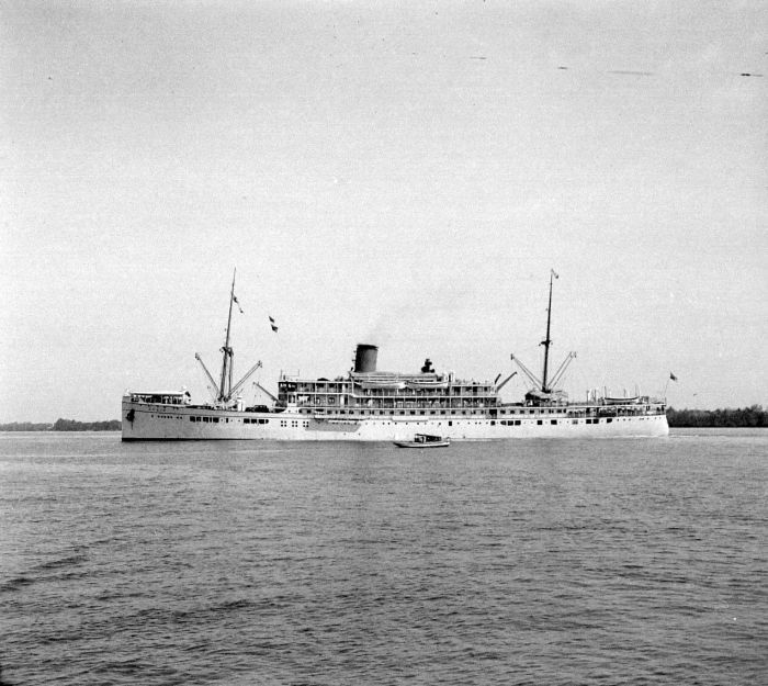 Negatief. Het schip Ophir van de Koninklijke Paketvaart Maatschappij (K.P.M.) vaart de haven van Belawan binnen, Sumatra's Oostkust